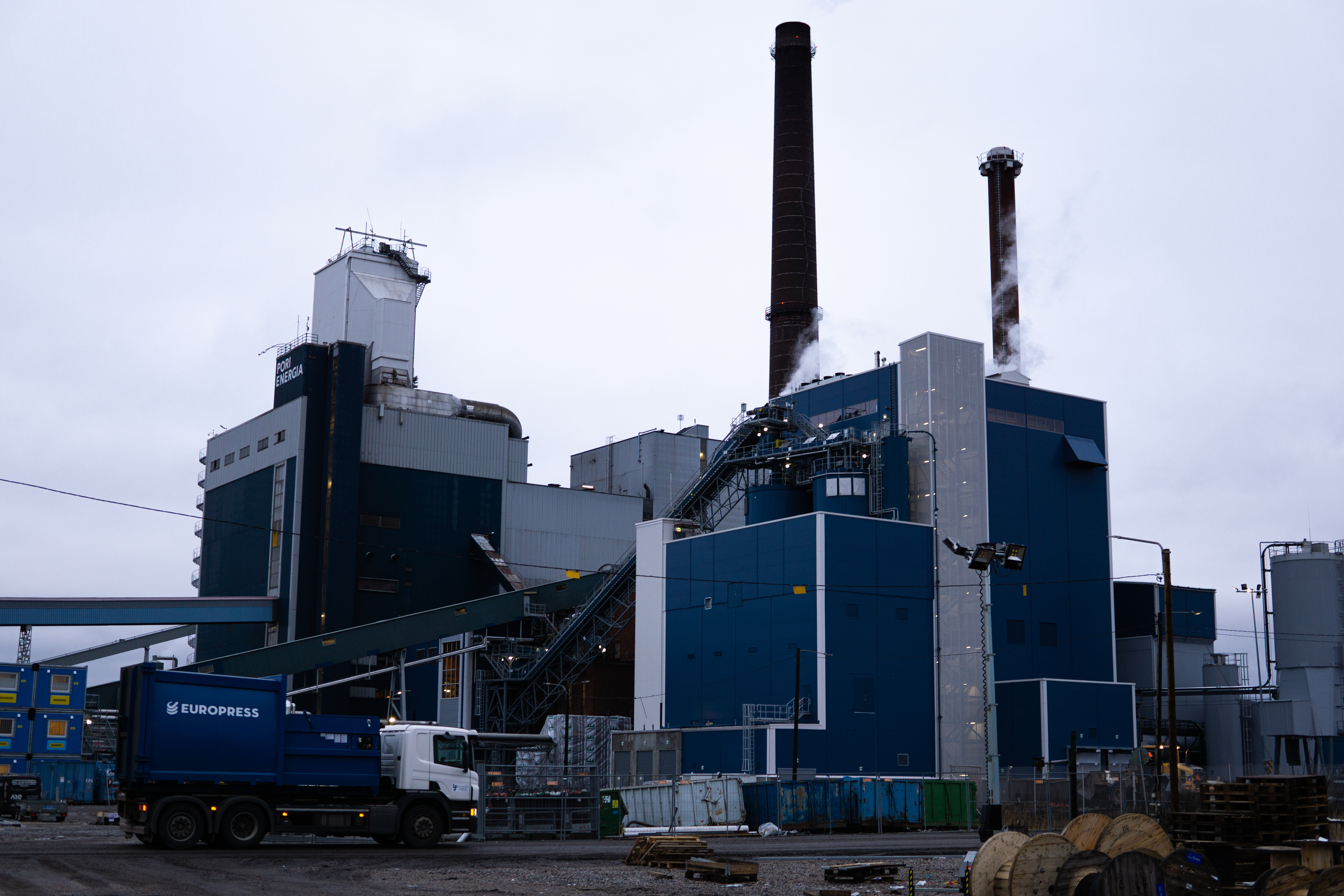 Porin Energian Aittaluodon Voimalaitos